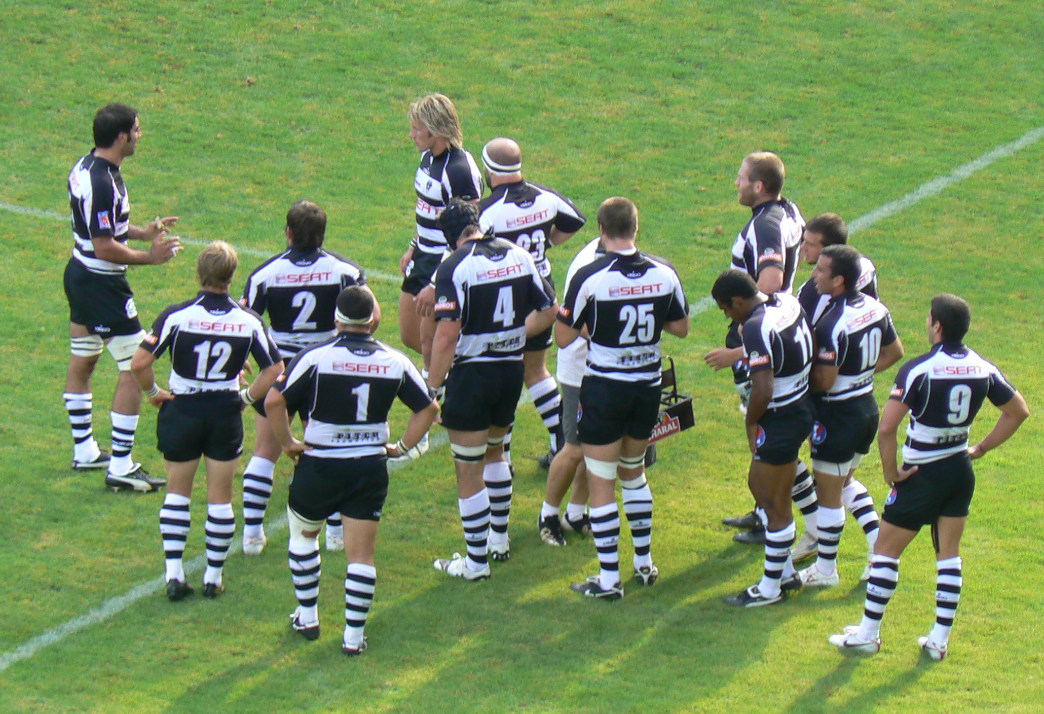 Les joueurs du CA Brive affrontent l'ASM Clermont Auvergne au stade Marcel-Michelin de Clermont-Ferrand